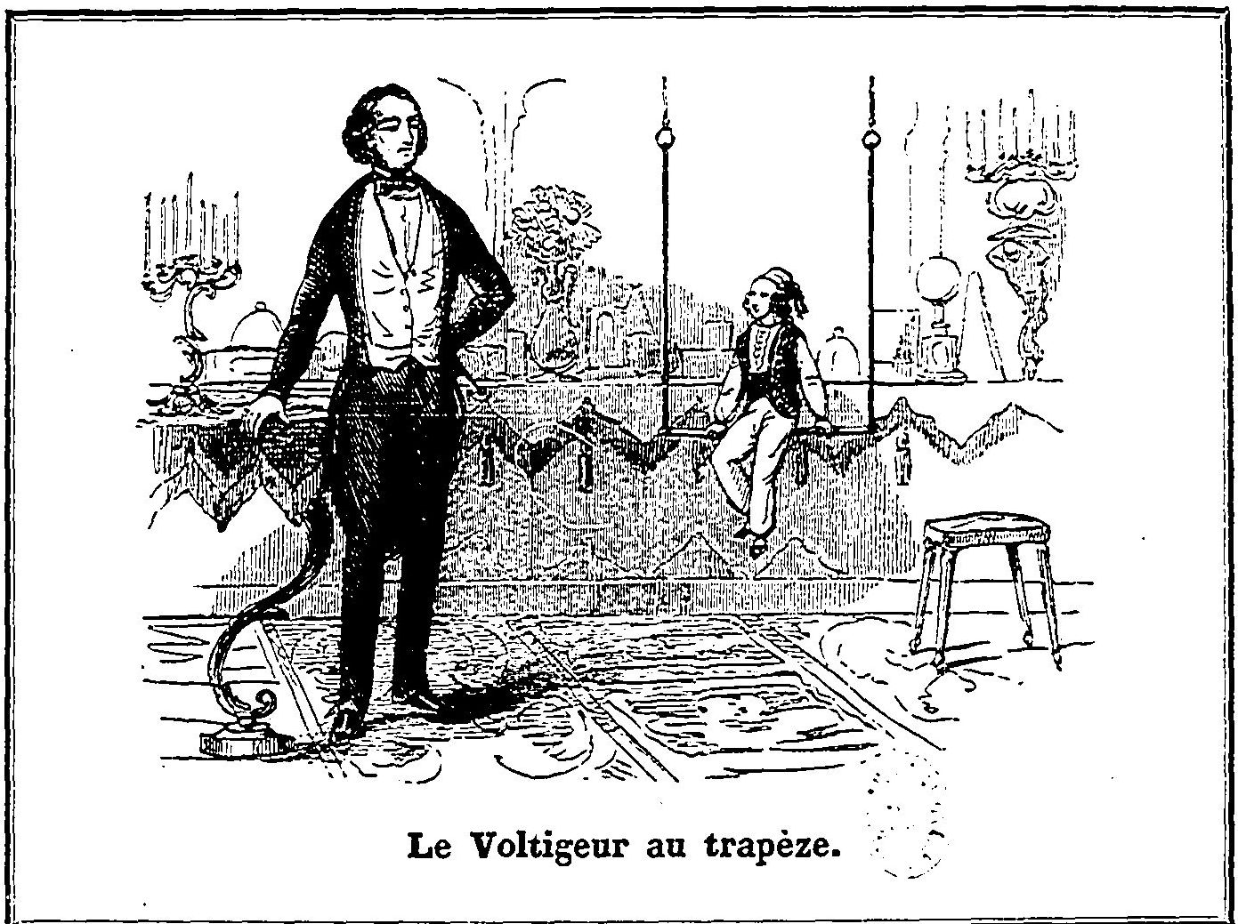 Planche de l'Album des soirées fantastiques de Robert-Houdin au Palais-Royal.